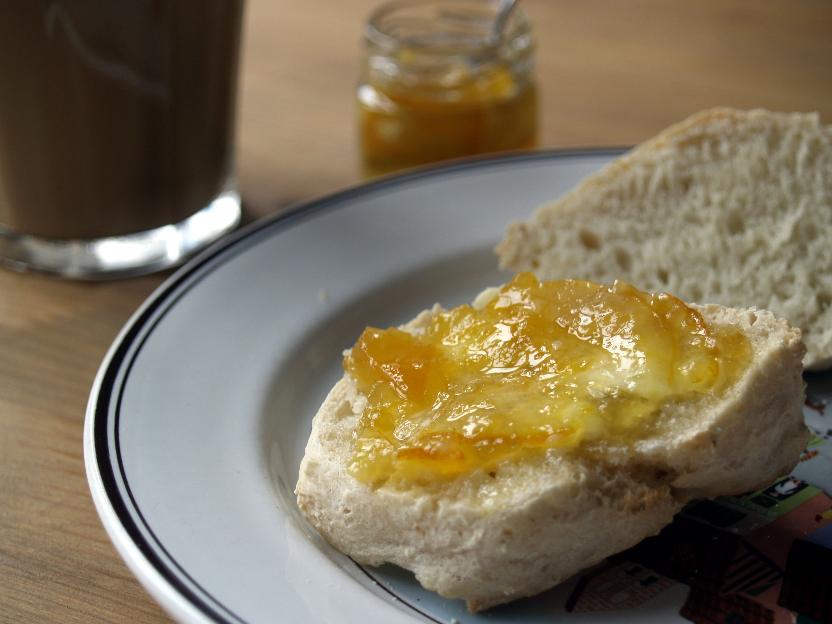 Bolle med appelsinmarmelade